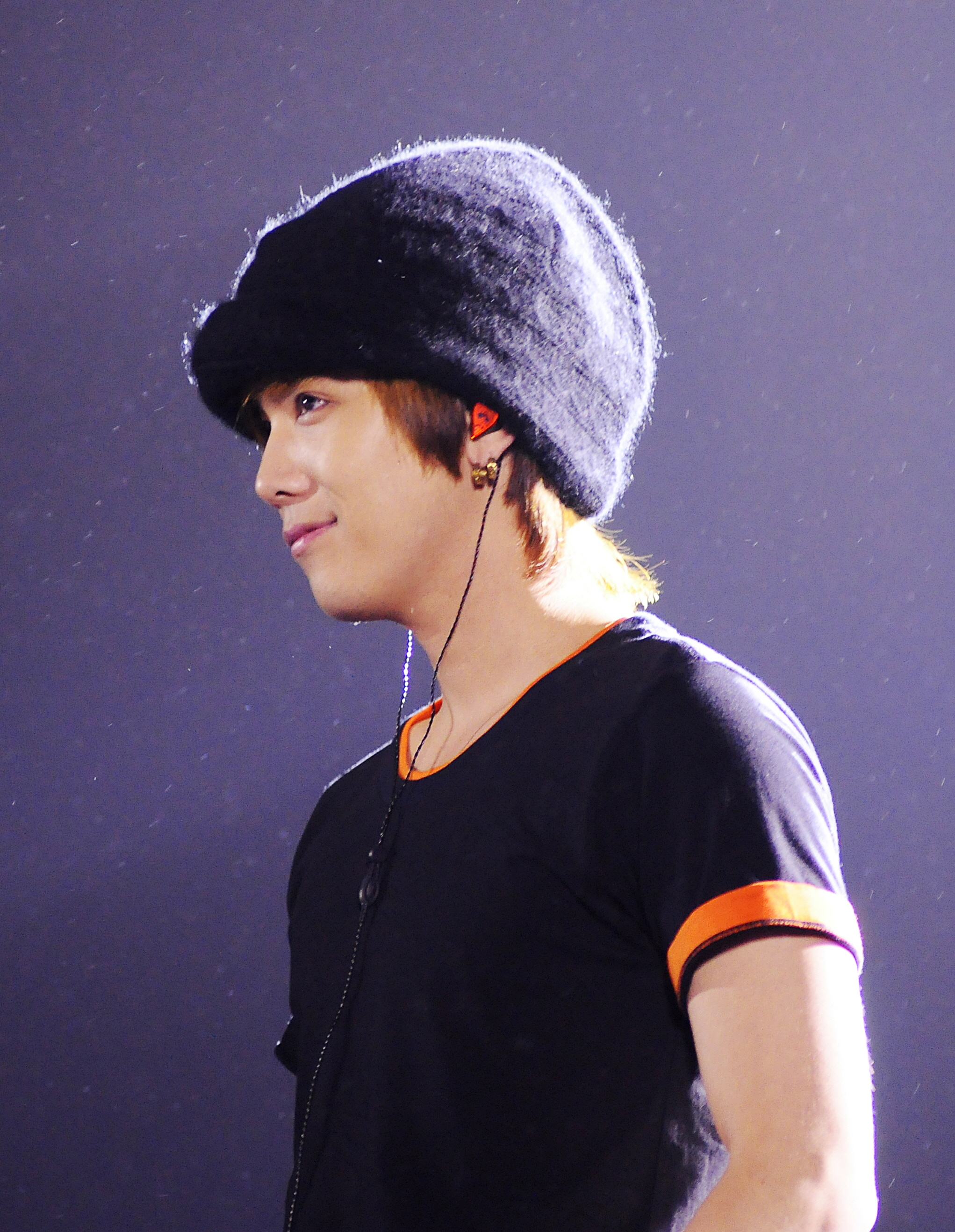 Kpop festival in Vietnam